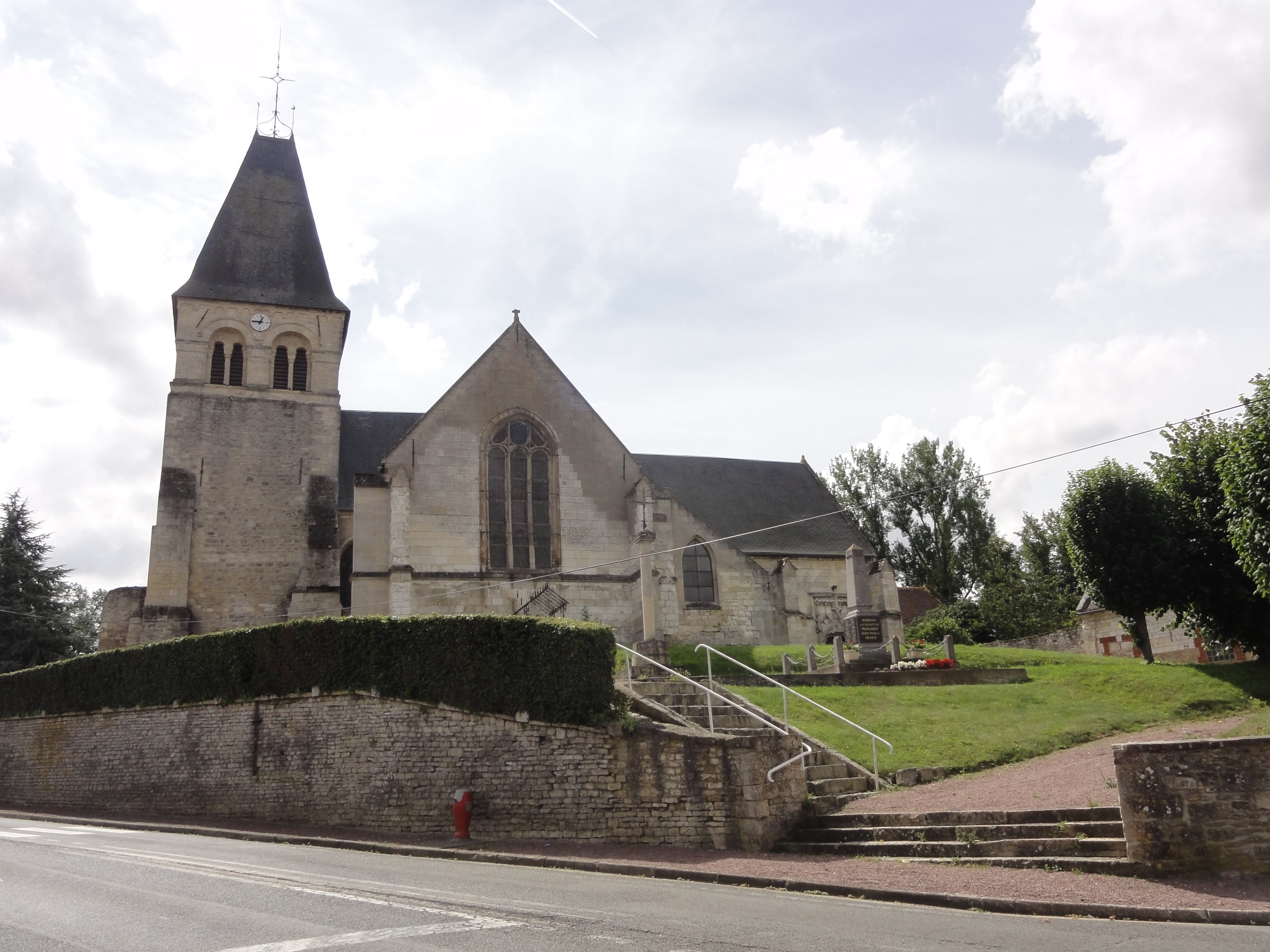 Eglise Saint-Fiacre de Pronleroy